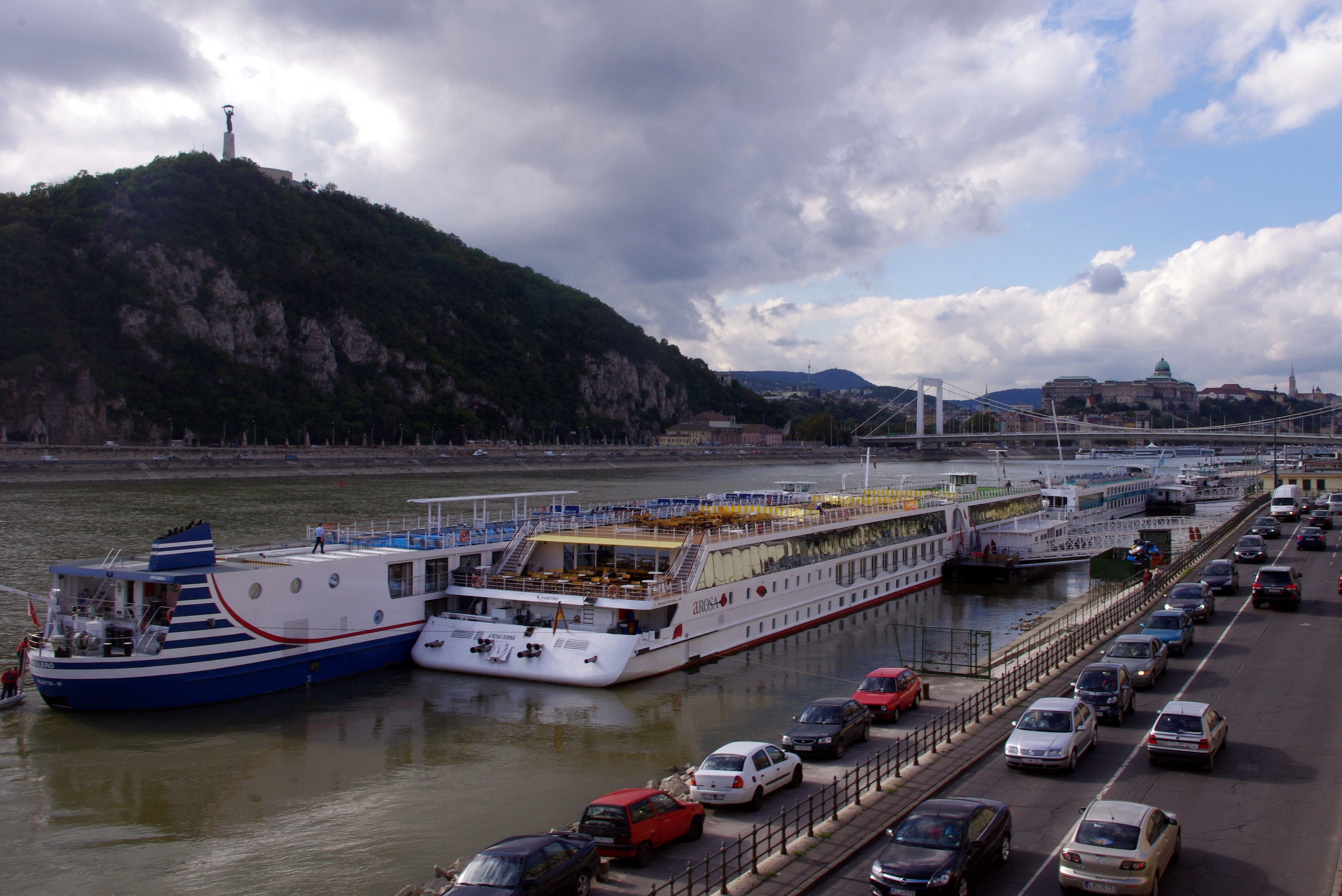 A-Rosa Donna und Bolero in Budapest